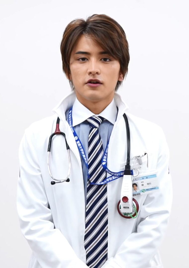 【仮面ライダーエグゼイド】DXゲームスコープ 発売記念